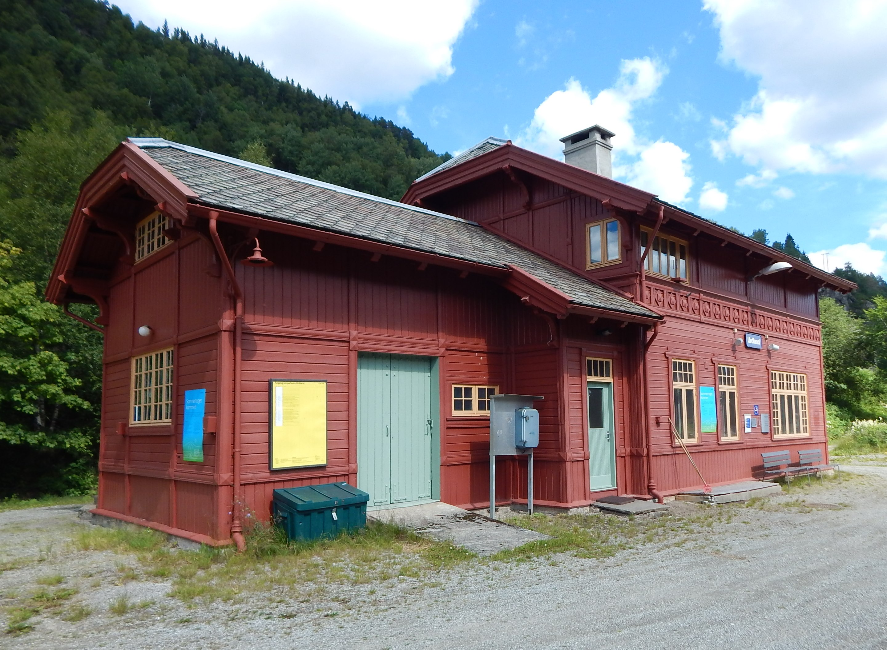 Urdland stasjon